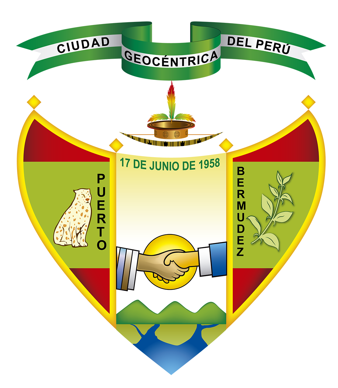 Escudo que identifica a Puerto Bermudez